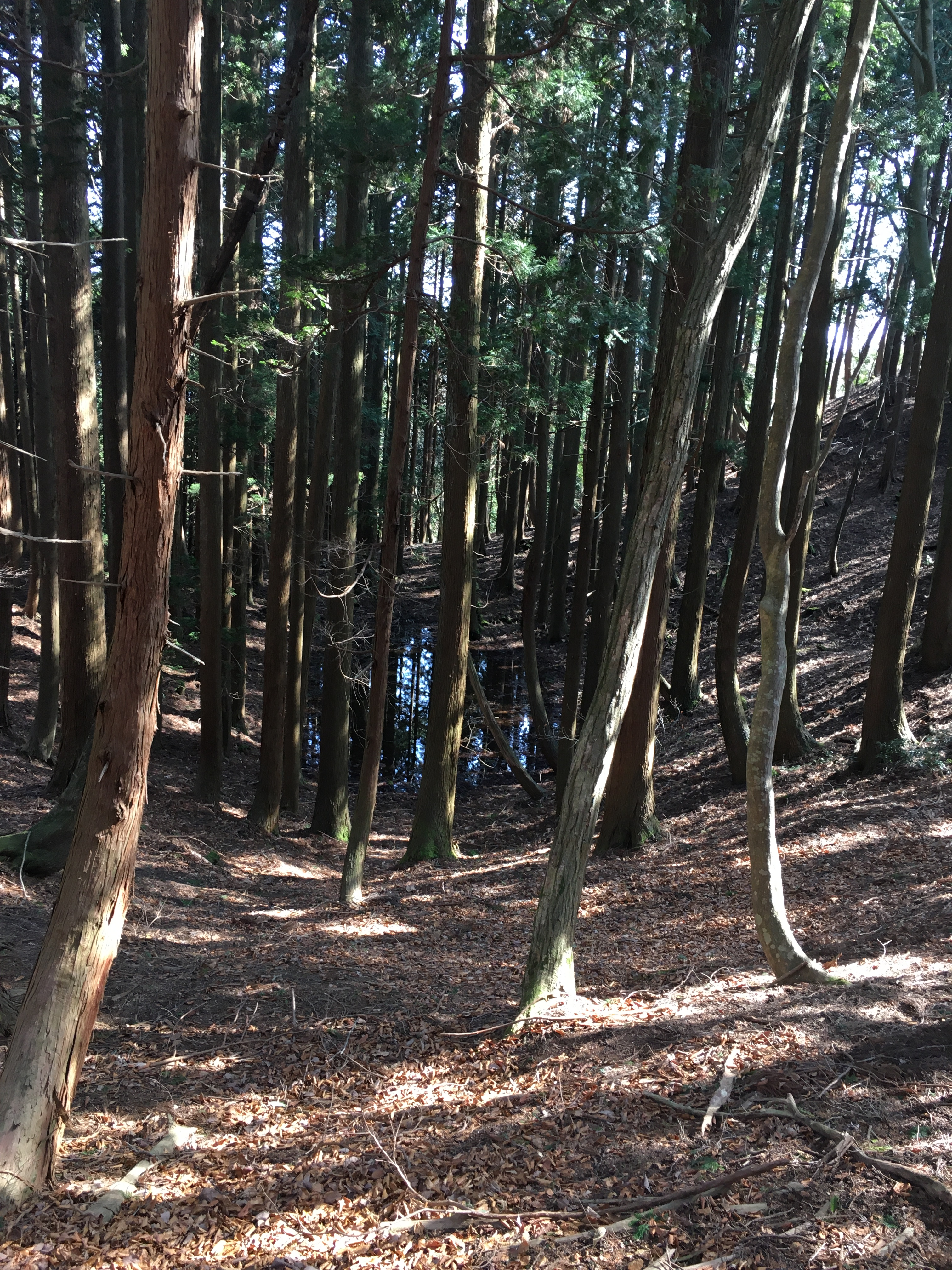 京丹後市峰山町磯砂山（いさなごさん）にある羽衣伝説が伝わる女池